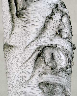 Gray Birch bark.